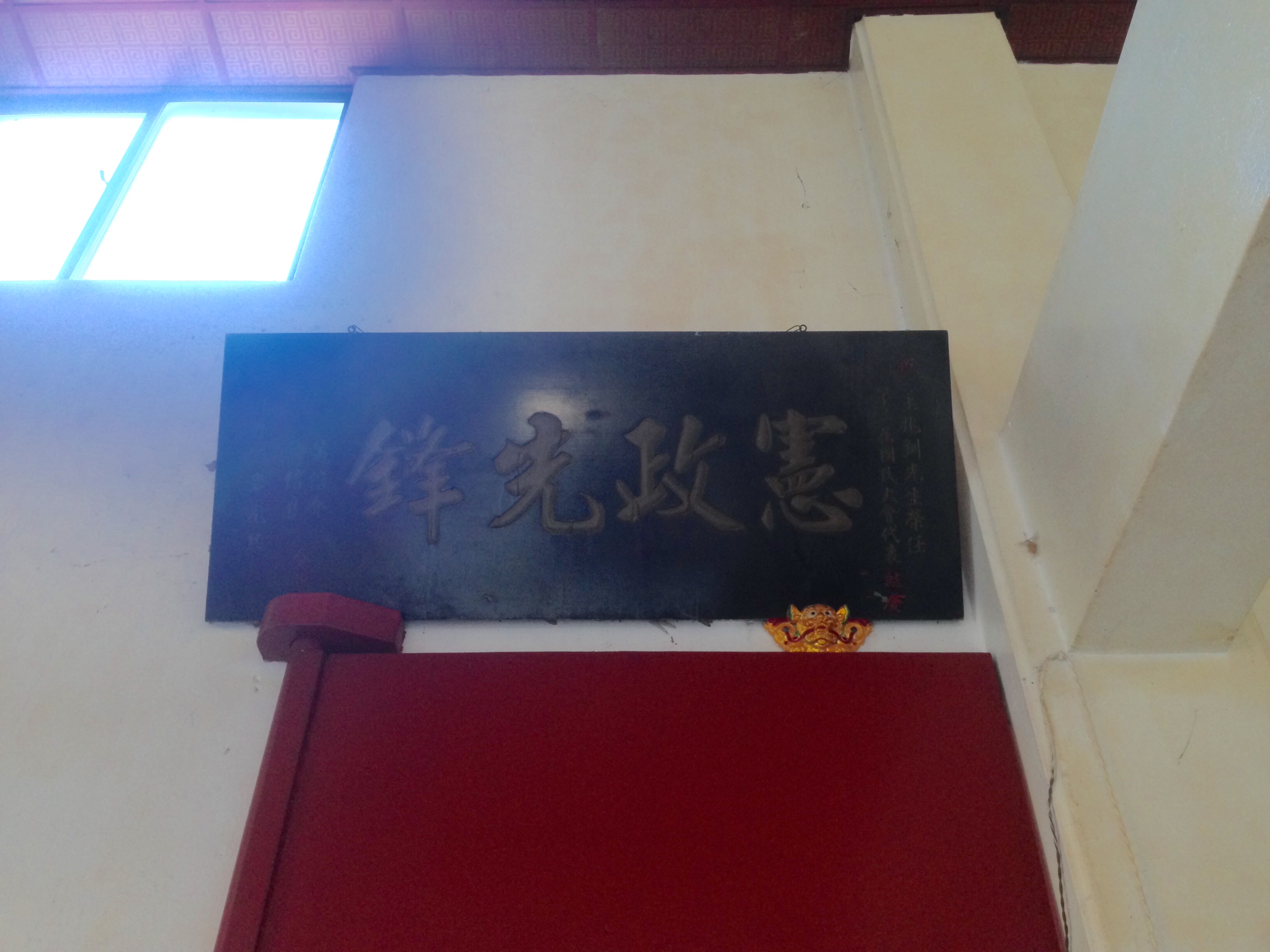 中文（台灣）: 無天禪寺憲政先鋒匾額